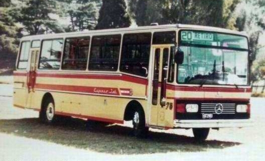 Línea 20 Expreso Caraza